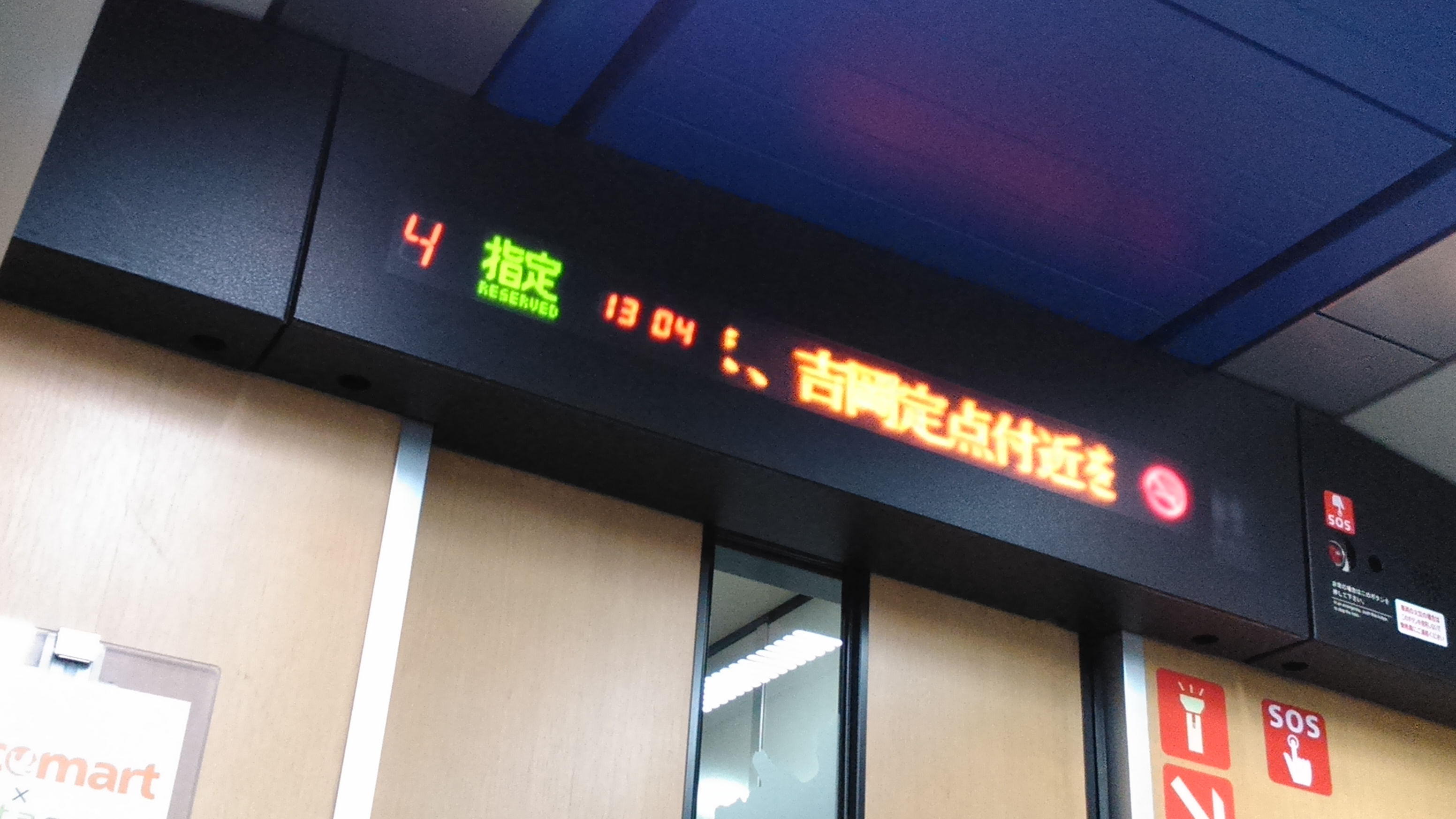 JR北海道列車當駛經吉岡定點時，顯示屏顯示「吉岡定點」的名稱。